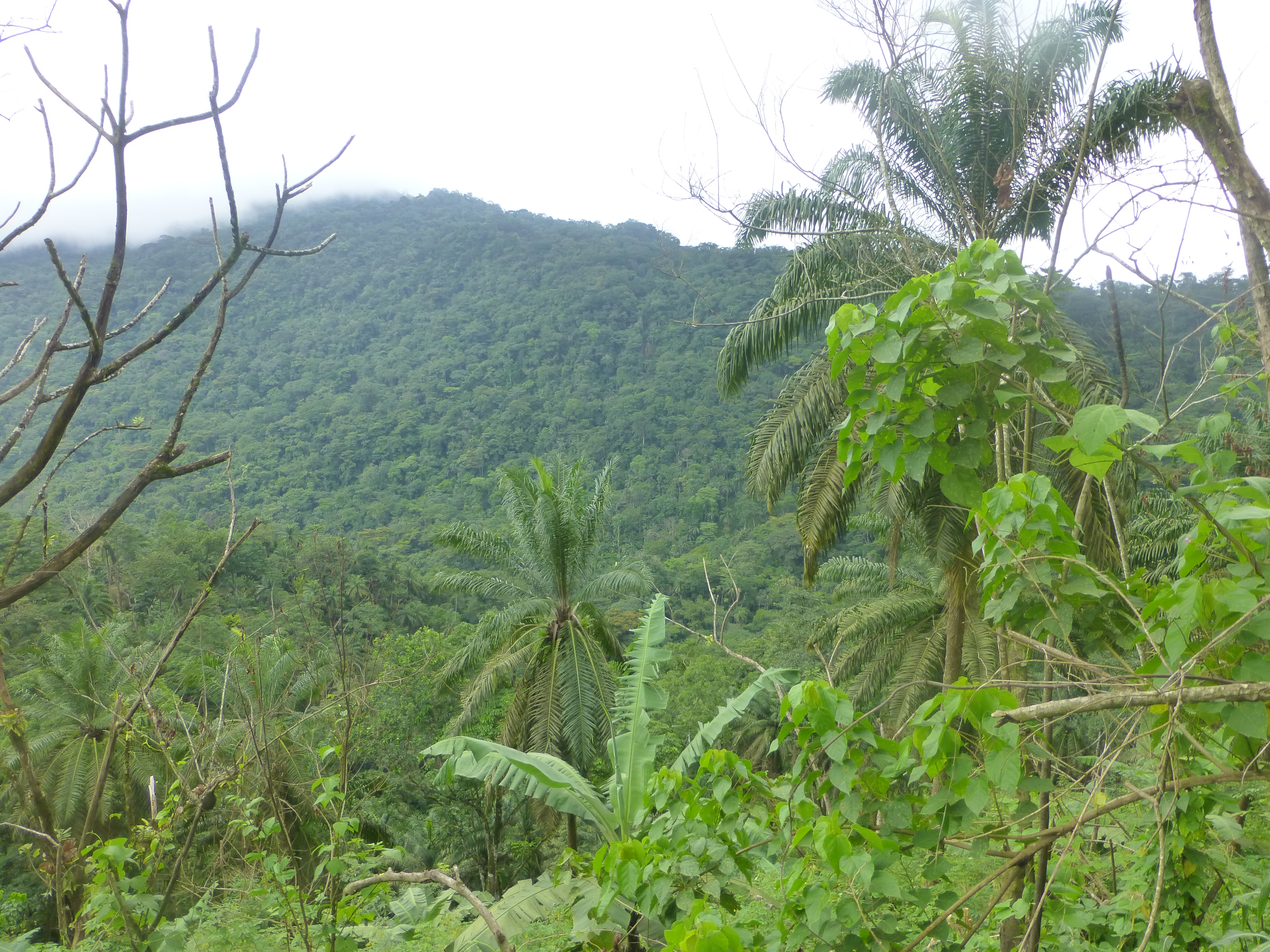 Sanctuaire de Bayang Mbo